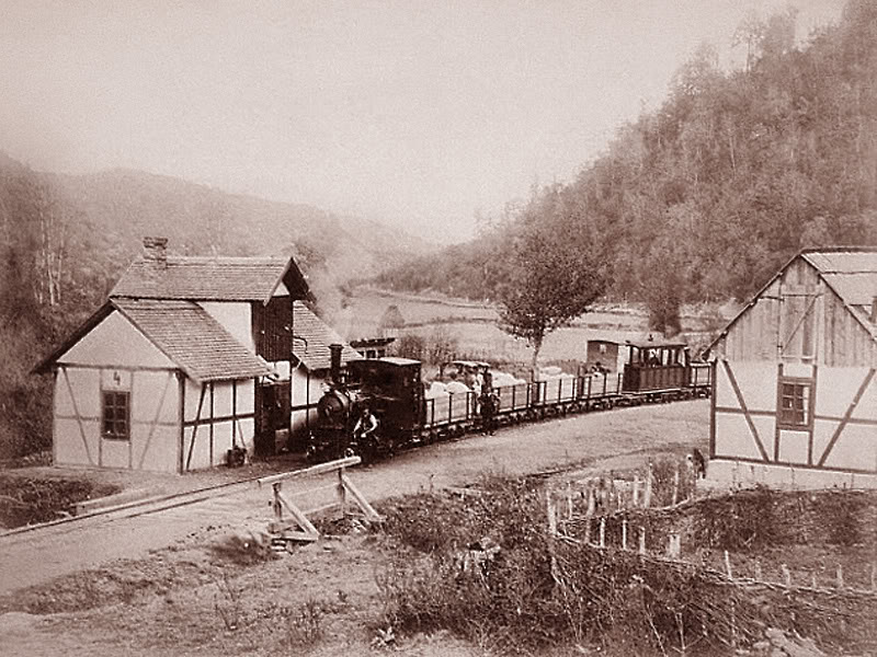 Аутор непознат, из личне архиве фотографија.